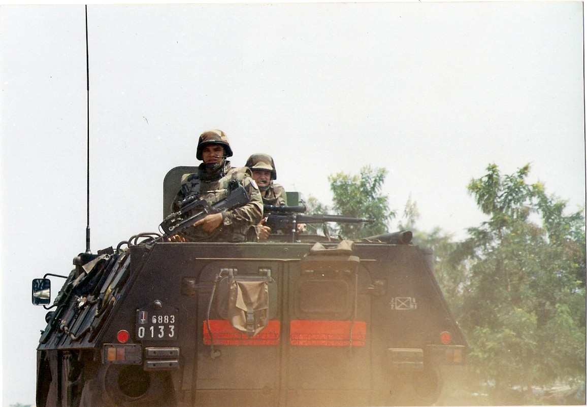 gomes firmino en mission dans l'opération licorne en côte d'ivoireLe marquage tactique l'identifie comme un véhicule de la 2e compagnie du 2e REI de la 6e BLB.